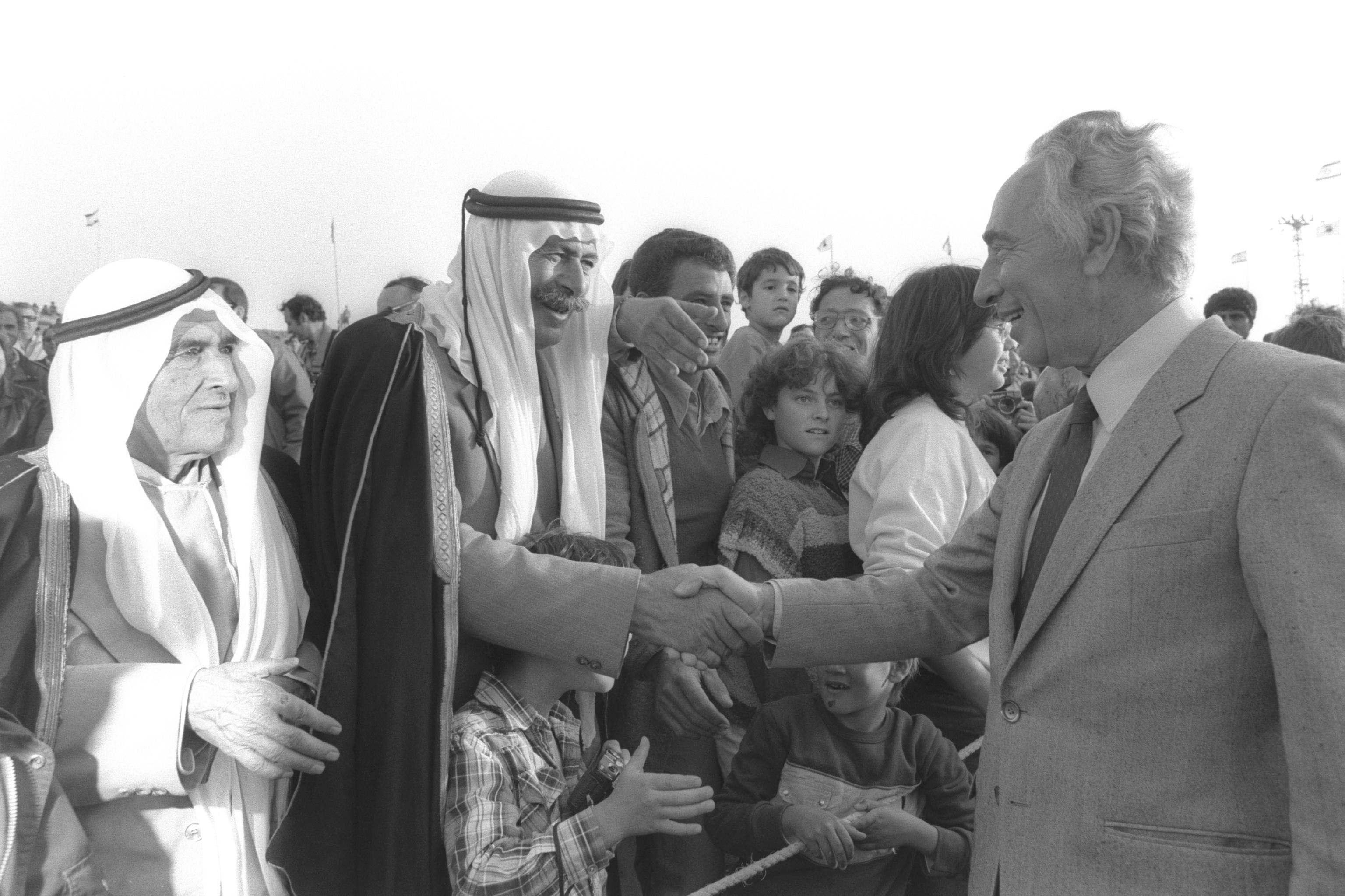 P.M. Shimon Peres shaking hands with Bedouin sheiks at the entrance to Beer Sheba (14/04/1985). ראש הממשלה שמעון פרס לוחץ ידיים לשייחים בדואים בכניסה לבאר שבע. Photo: HERMAN CHANANIA.